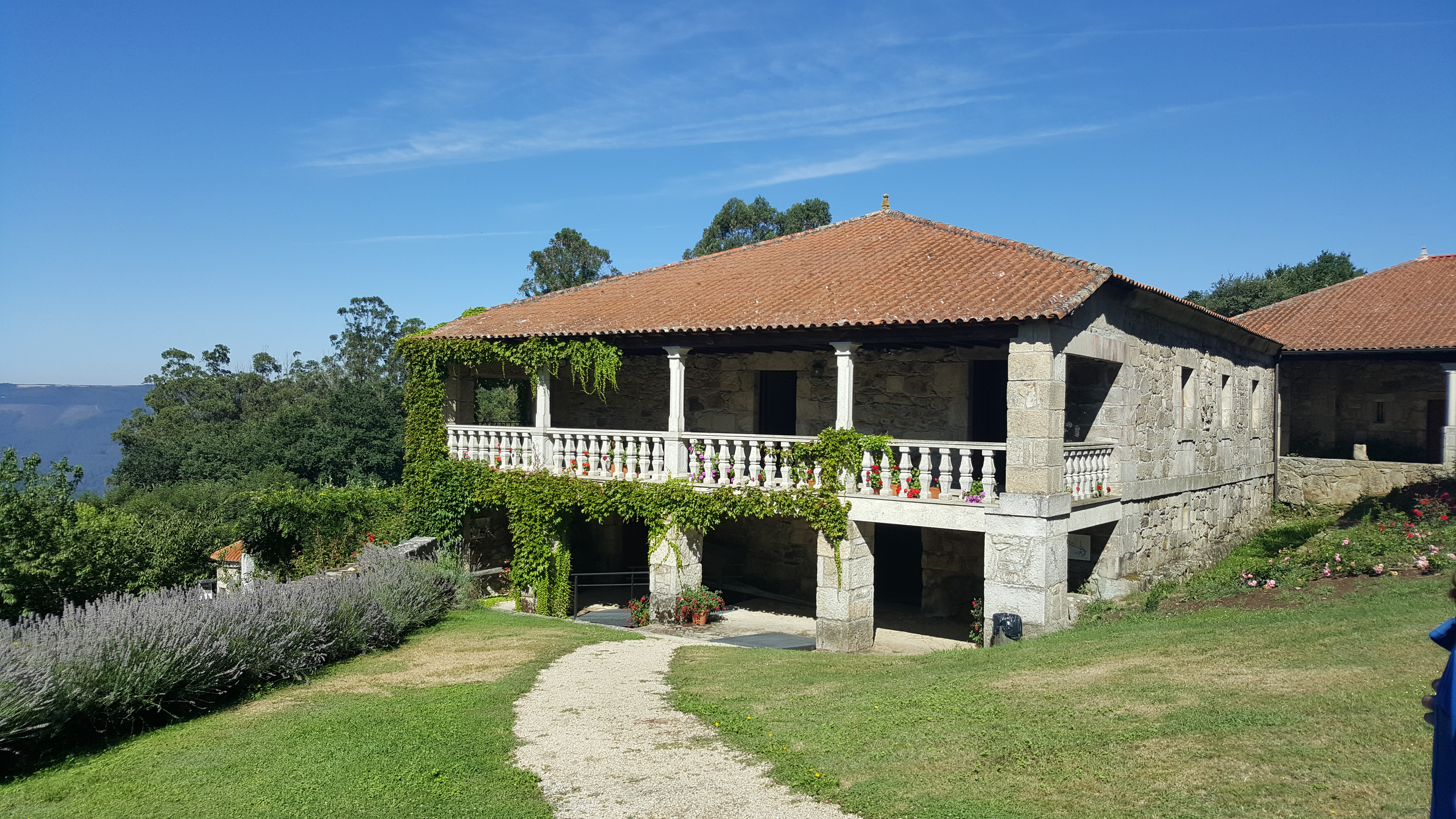 Unha das construccións do Pazo de Arxeriz. Hoxe museo etnográfico.